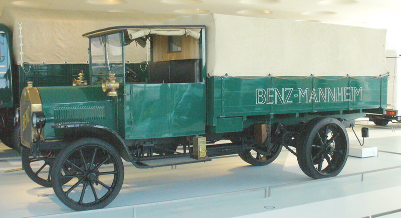 Mercedes-Benz Museum Stuttgart - Benz Lastwagen 1912 3-tonnes.